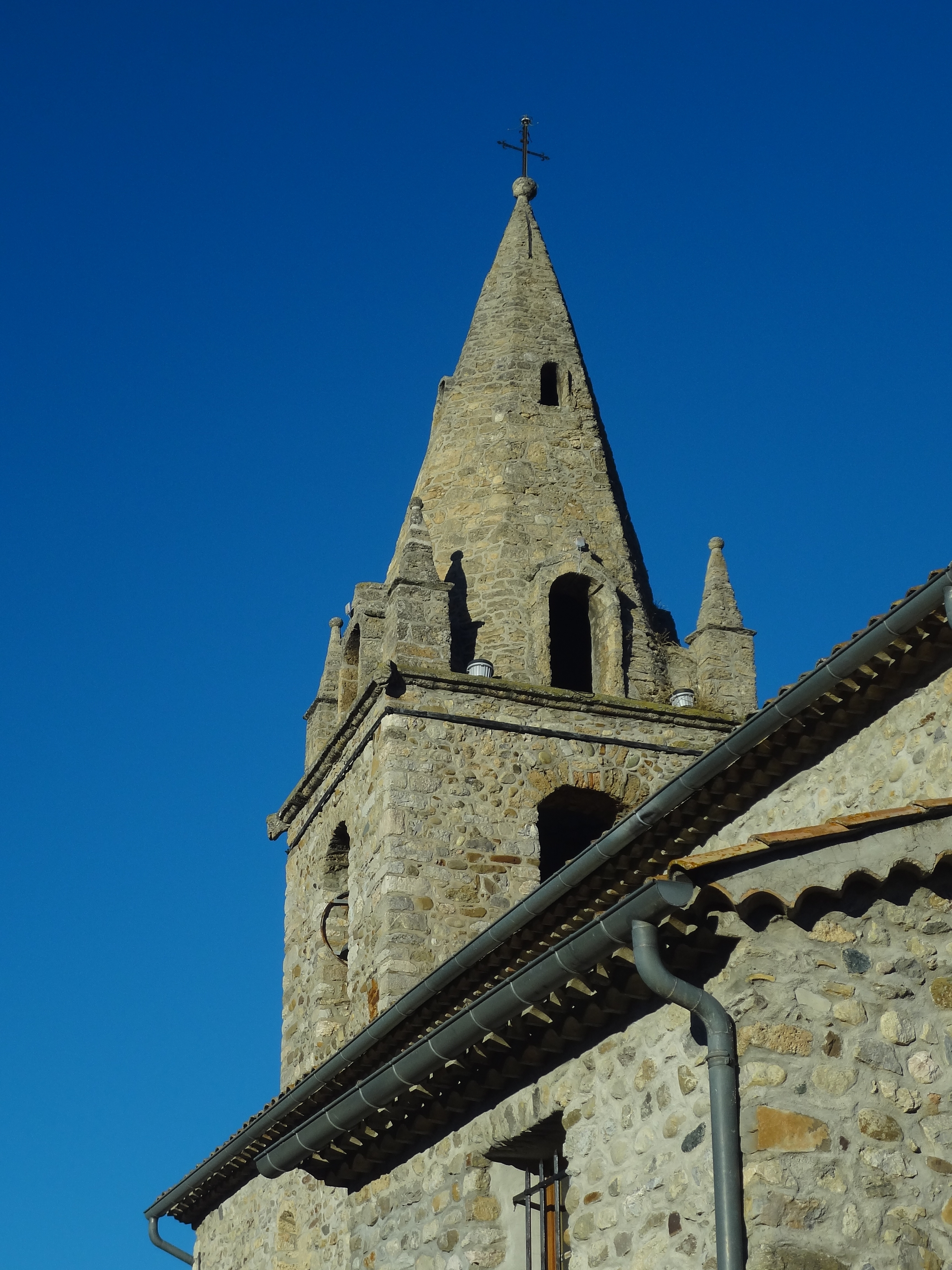 Clocher de pierre cantonné de 4 pyramidions, typique de l'art roman alpin